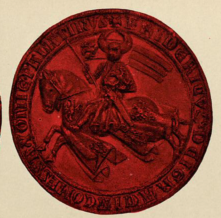 Friedrich von Sachsen